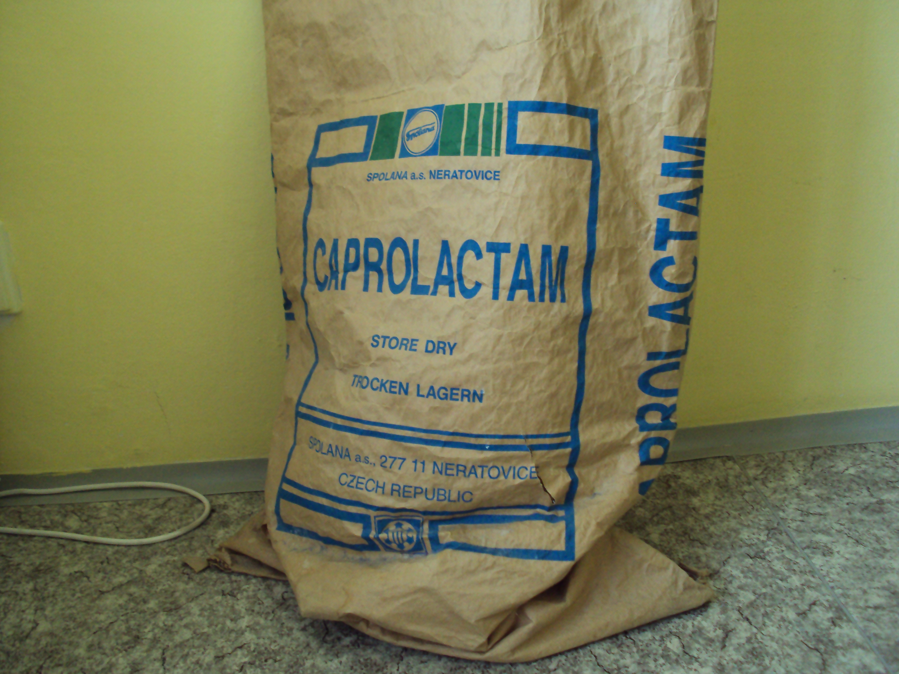 Česky: Pytle na kaprolaktam z neratovické Spolany z roku 1994